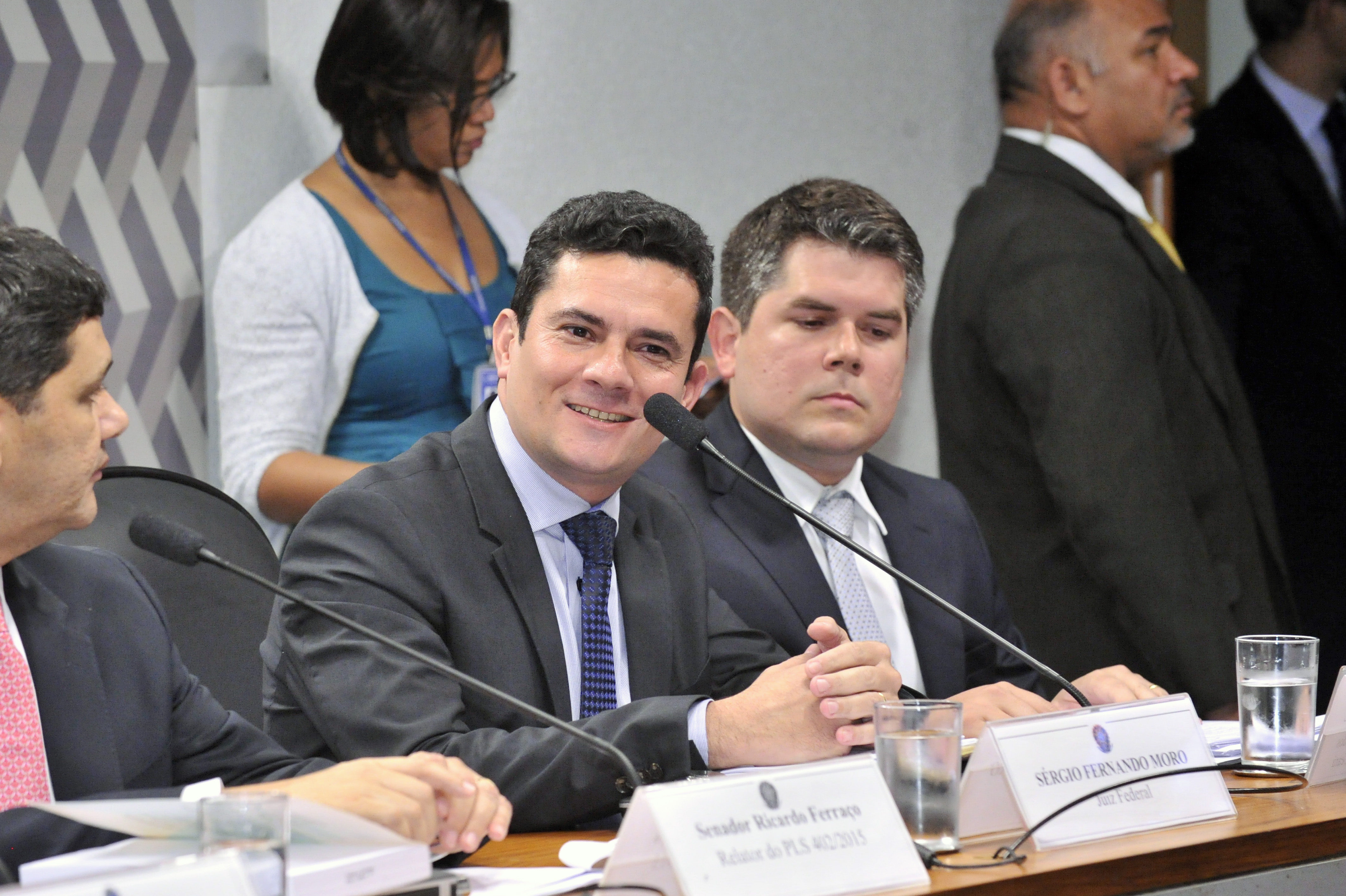 Comissão de Constituição, Justiça e Cidadania (CCJ) realiza audiência pública interativa para instruir o PLS 402/2015, que altera o Código de Processo Penal, em relação aos recursos. Mesa (E/D): relator do PLS 402/2015, senador Ricardo Ferraço (PMDB-ES); juiz federal, Sérgio Fernando Moro; presidente da Comissão de Estudos Constitucionais da OAB no Ceará, Fábio Zech Sylvestre Foto: Waldemir Barreto/Agência Senado